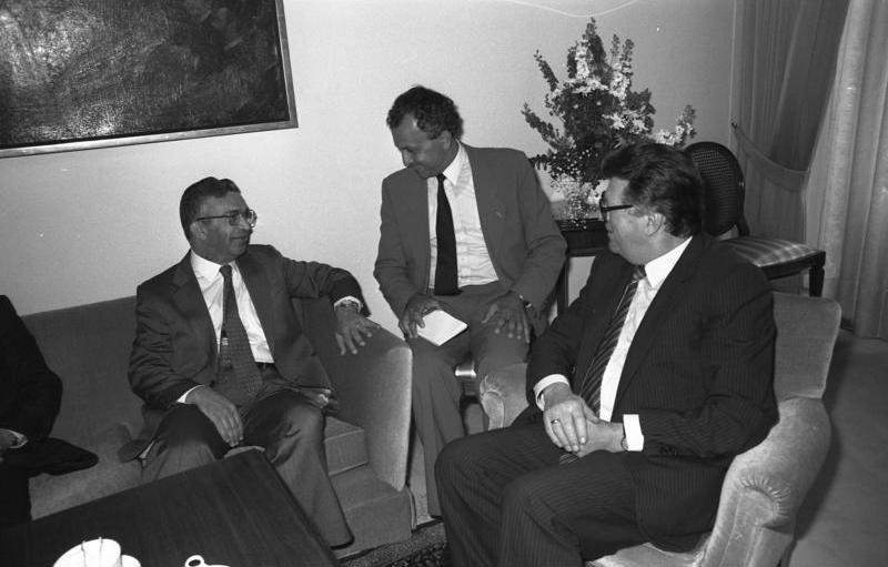 2.-4.6.1987 Besuch einer Delegation des irakischen Nationalrates unter der Leitung von Parlamentspräsident Dr. Sadoum Hamadi in Bonn 2.6. Gespräch mit Bundestagspräsident Dr. Philipp Jenninger im Bundeshaus